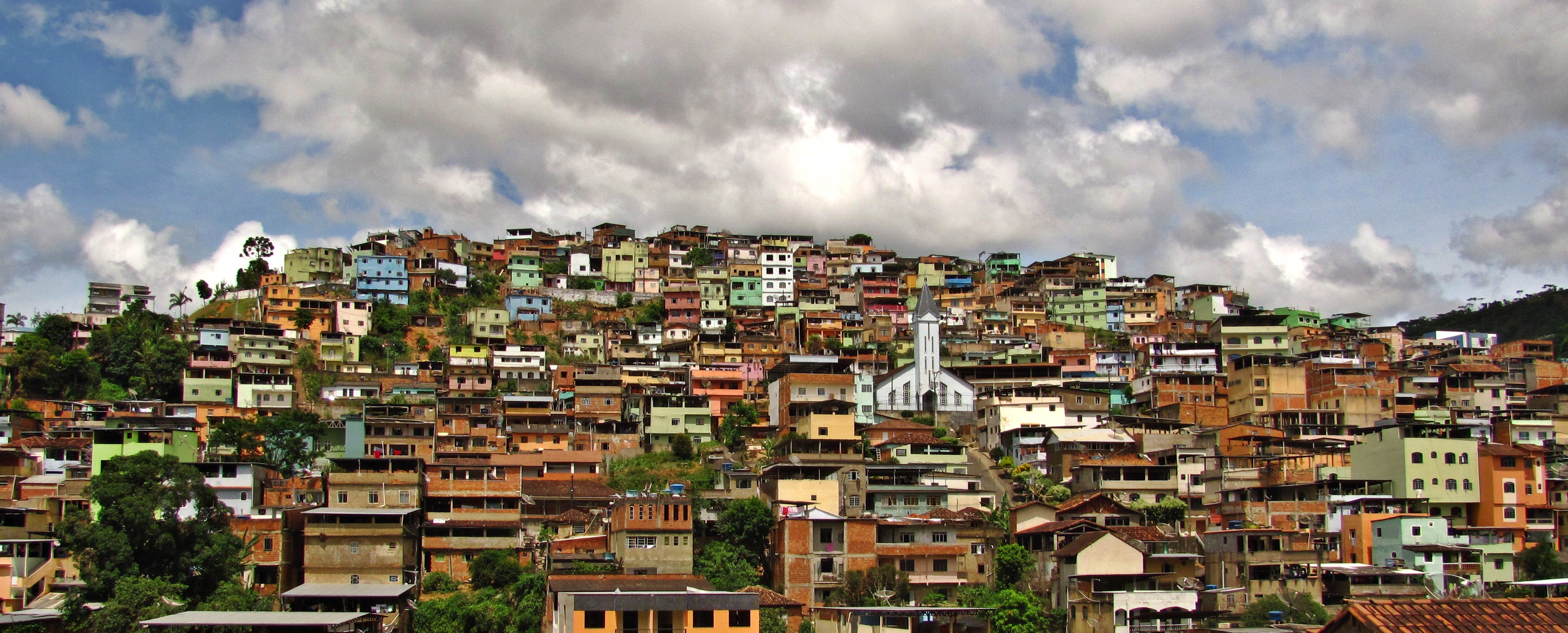 Panorâmica do bairro de Santa Luzia, um dos mais populosos de Manhuaçu.